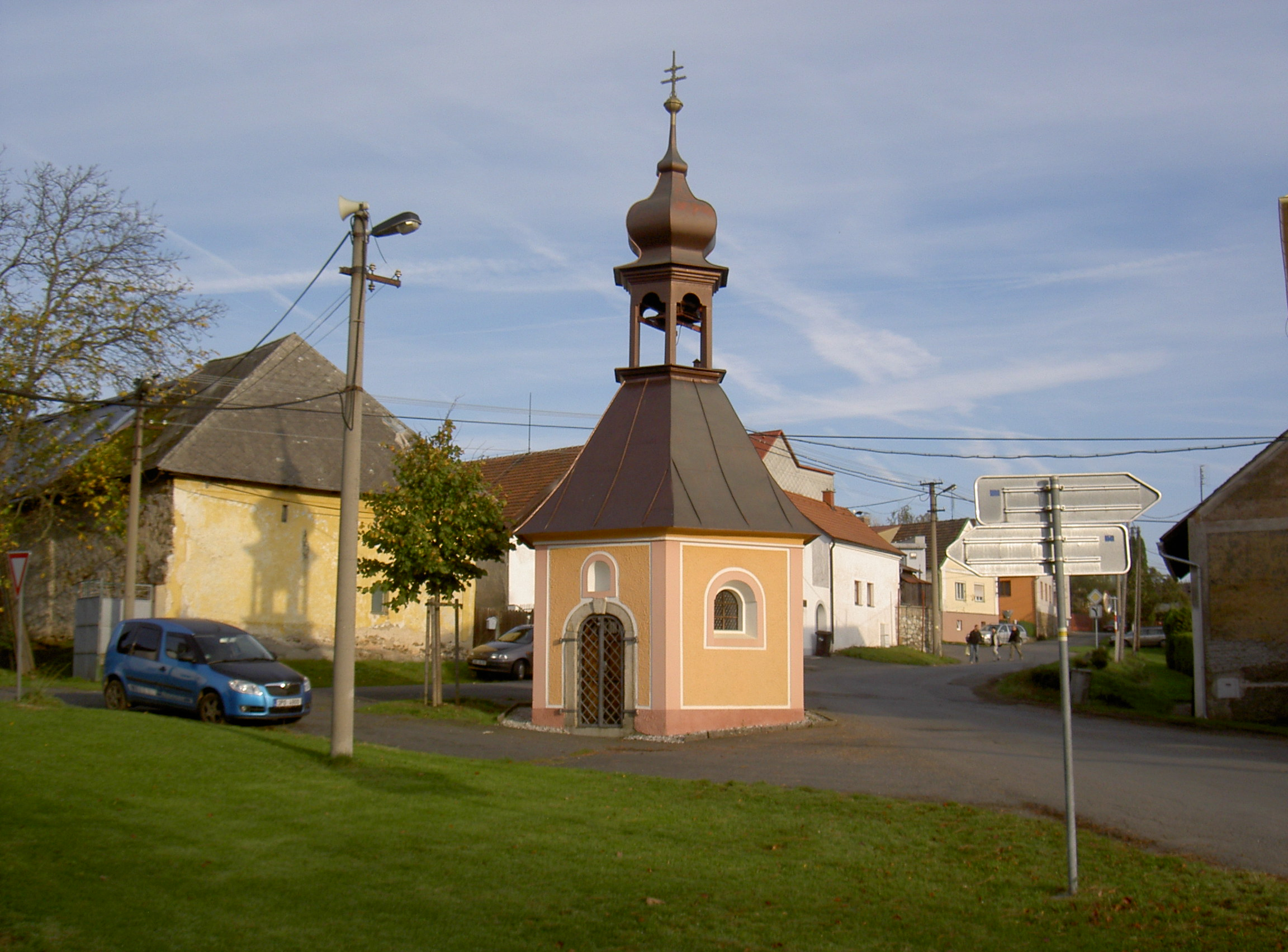 Kapelle auf dem Dorfplatz in Draženov